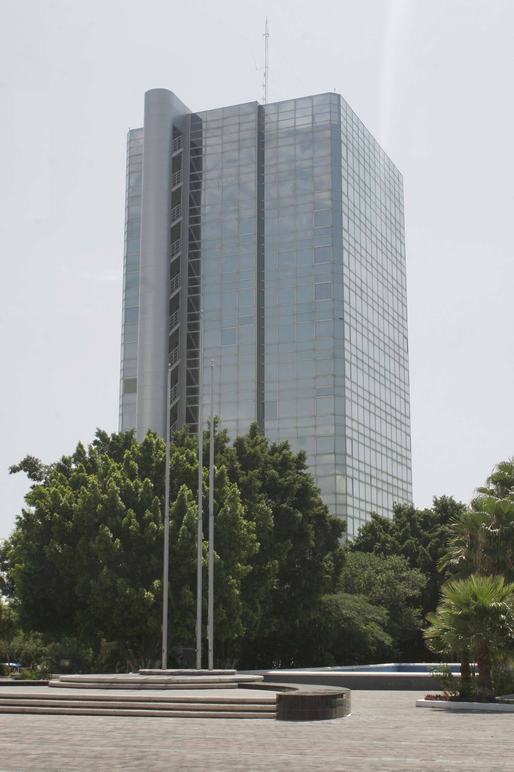 Torre de Gobierno desde la Plaza del Hemiciclo, en Ciudad Victoria, Tamaulipas, México